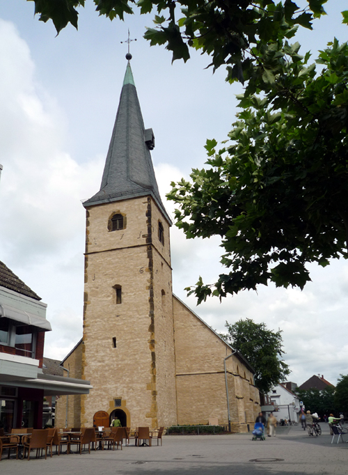 Ev. Stadtkirche im Ortsteil Rheda von Rheda-Wiedenbrück